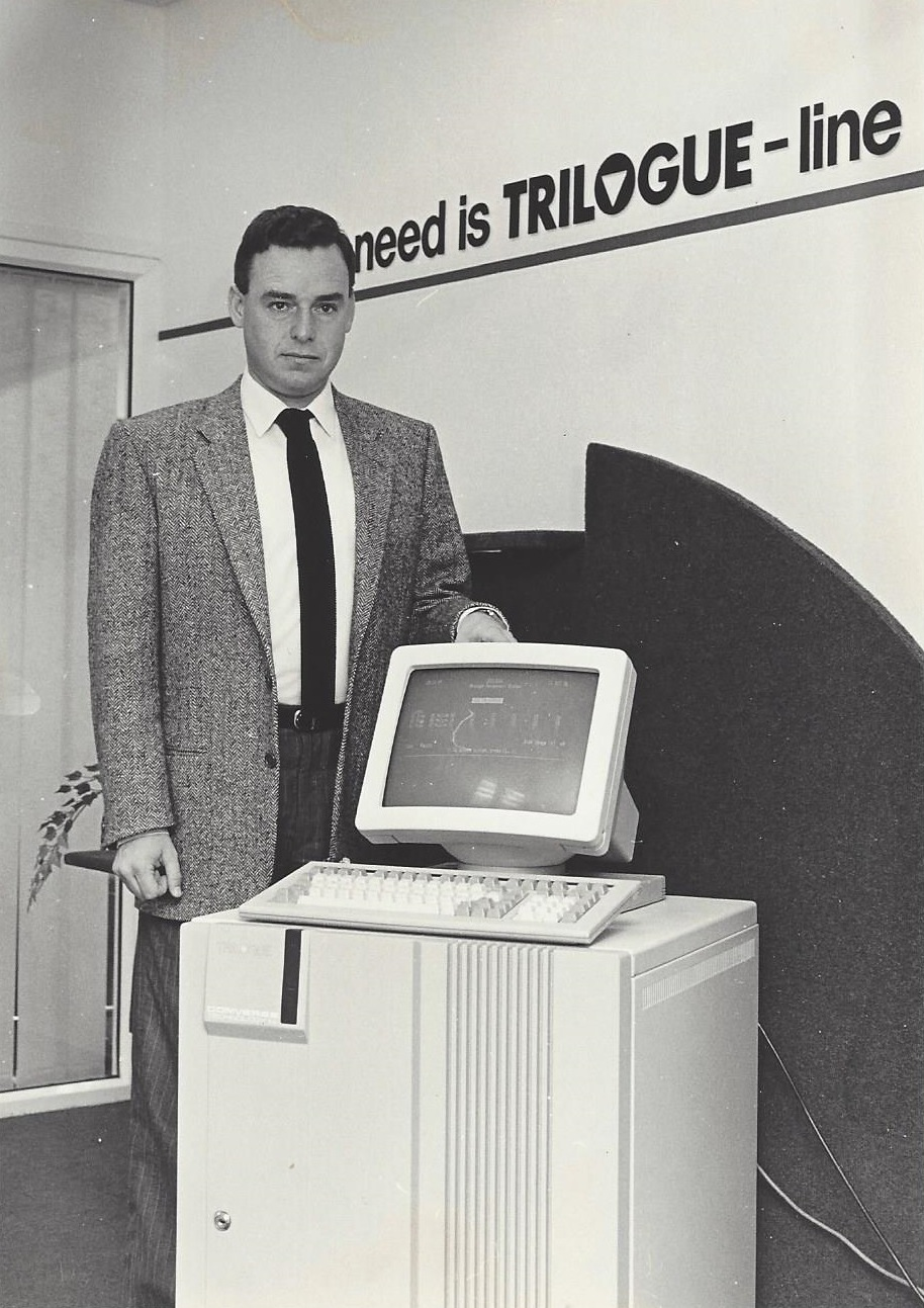 בועז משעולי